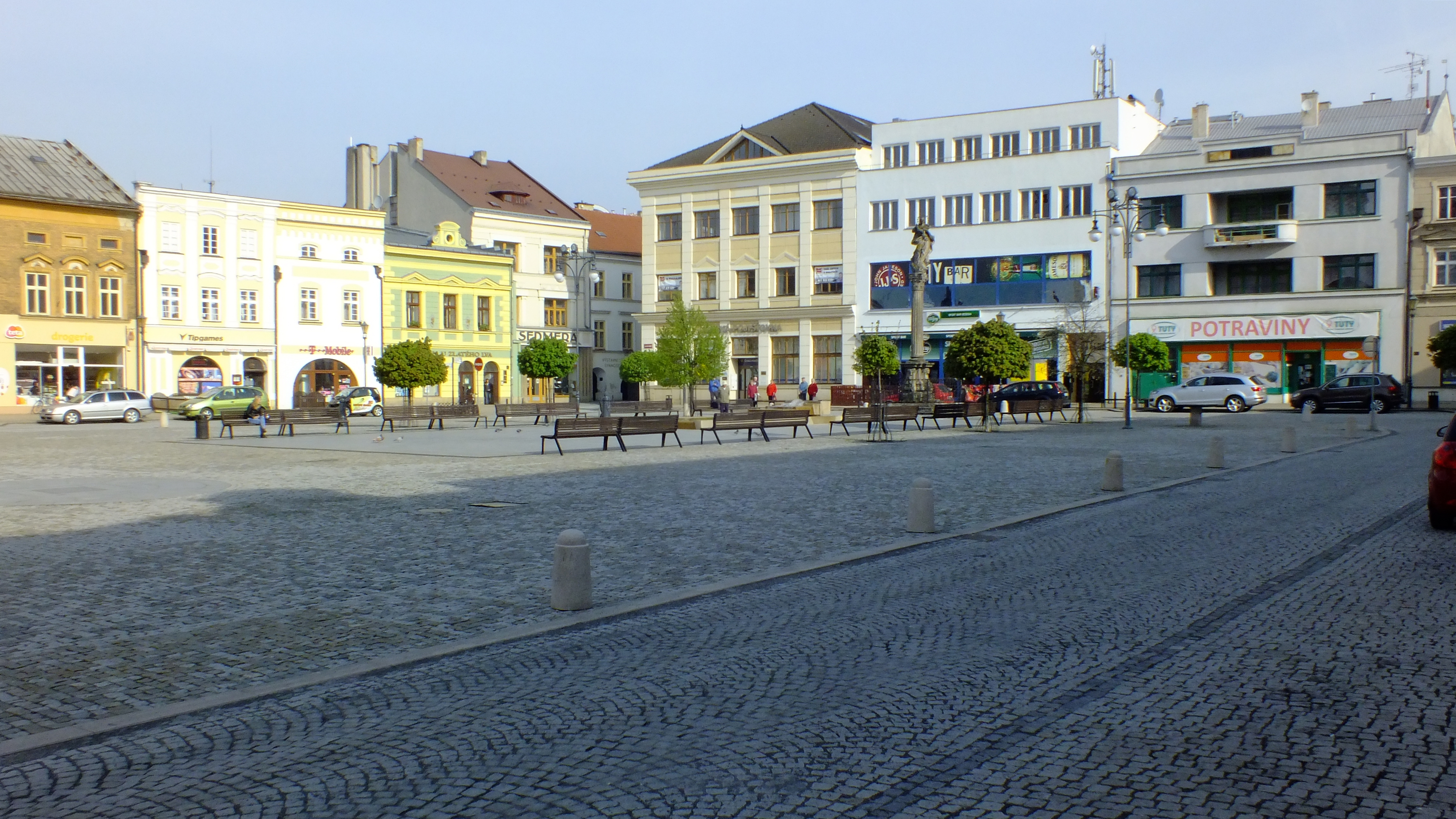 centrum města